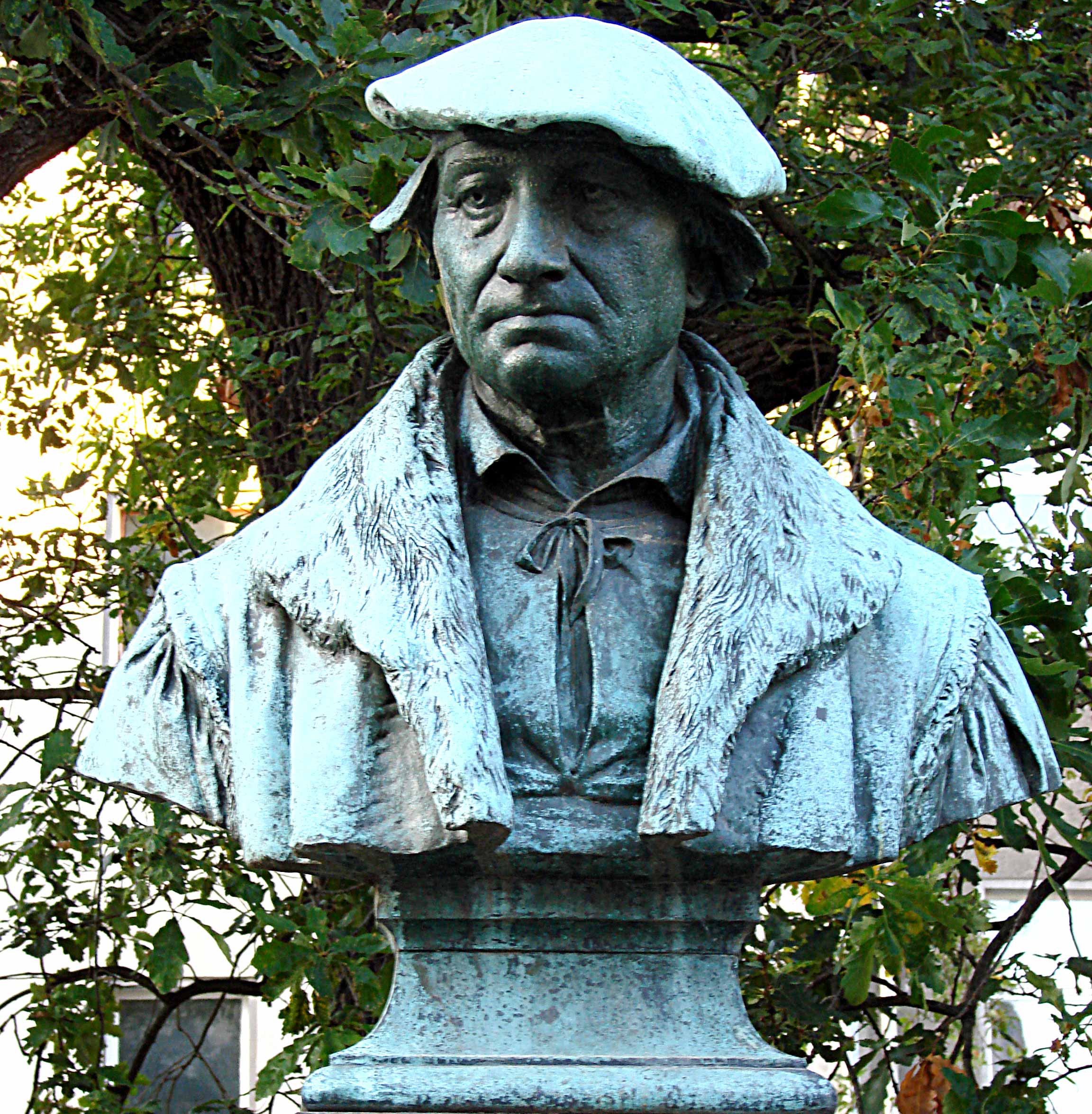 Bugenhagenstatue in Wittenberg auf dem Kirchplatz an der Stadtkirche